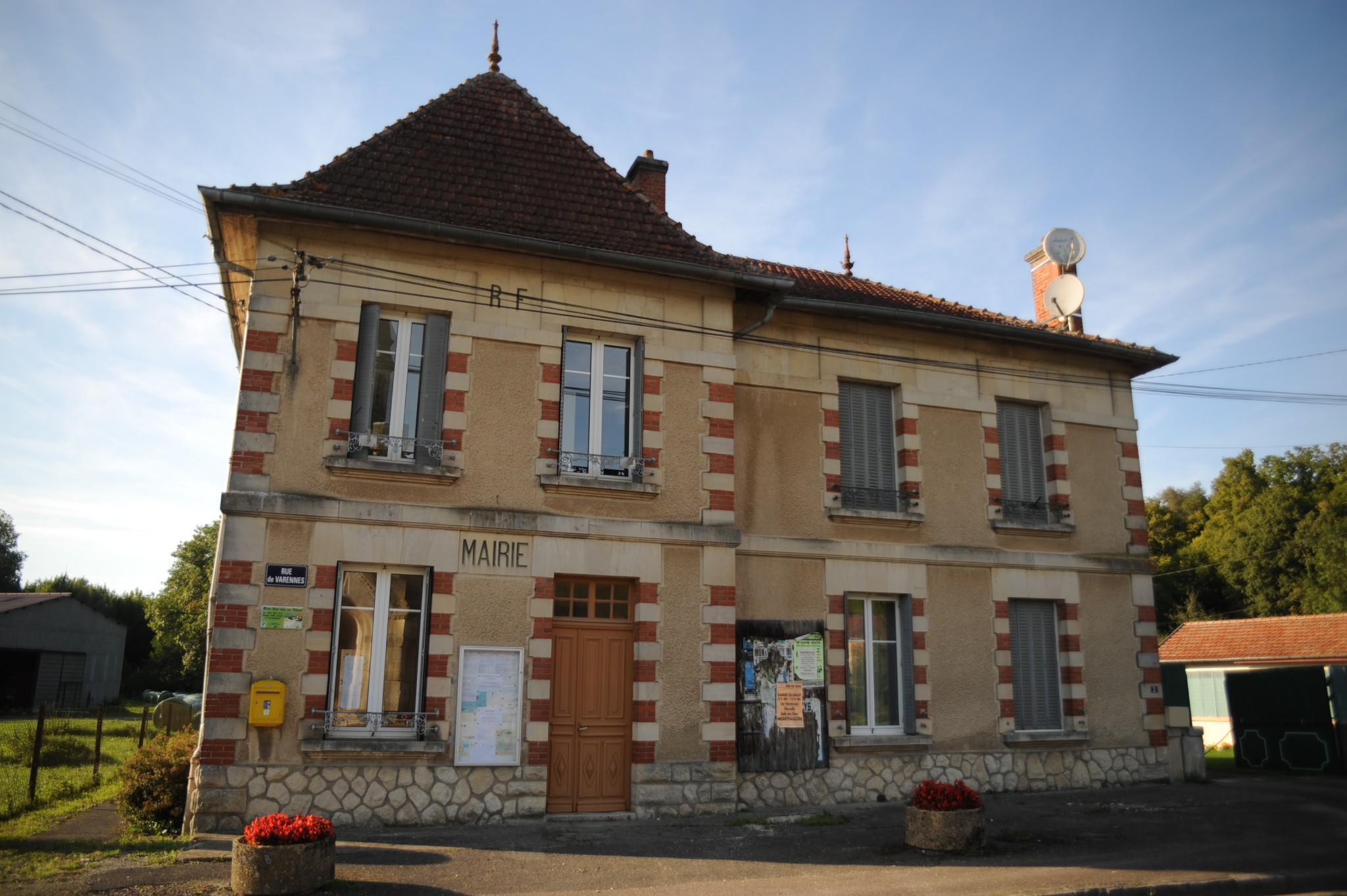 La mairie